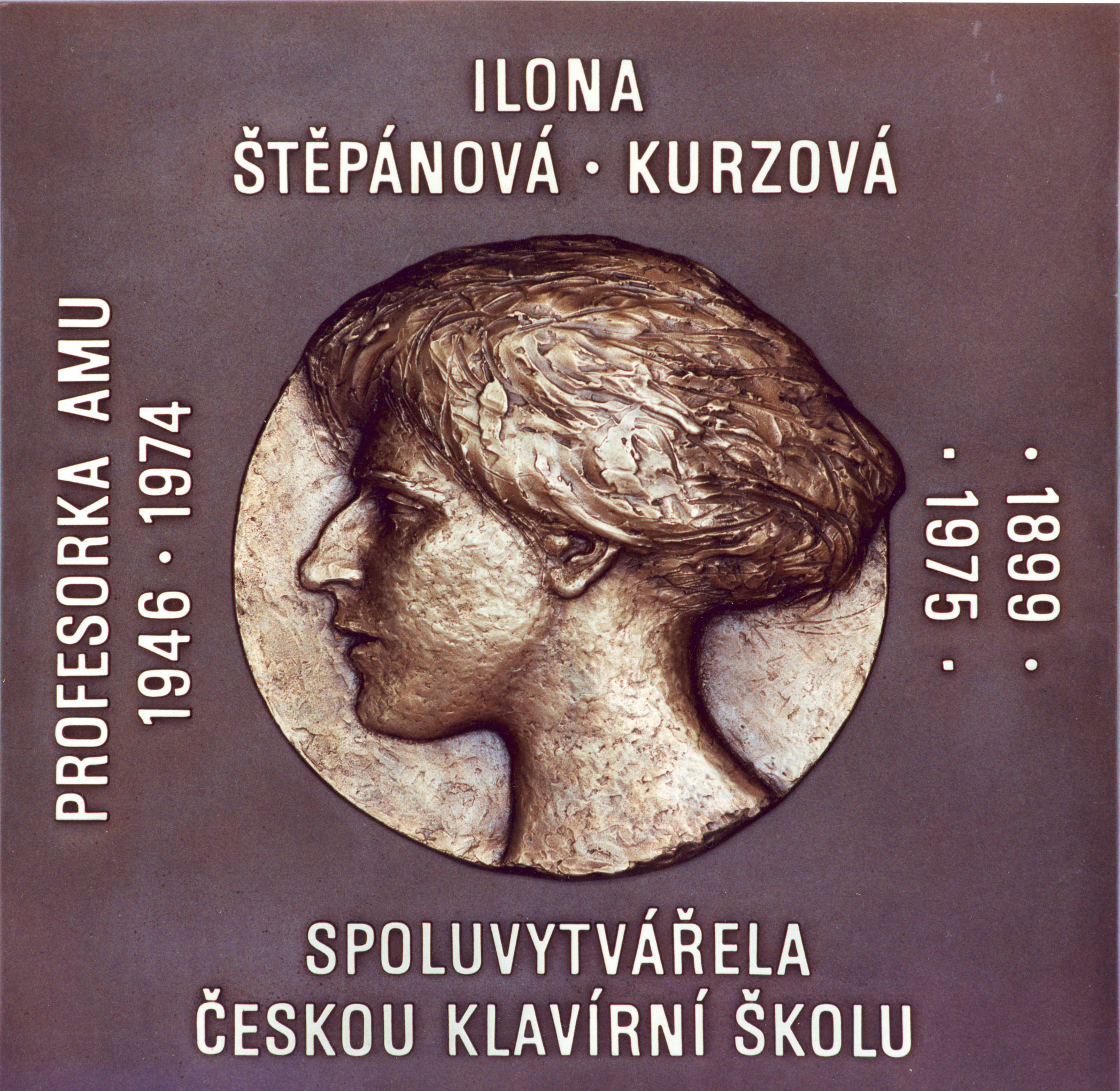 Ilona Štěpánová-Kurzová, pamětní deska v budově Hudební fakulty AMU v Lichtenštejnském paláci na Malé Straně